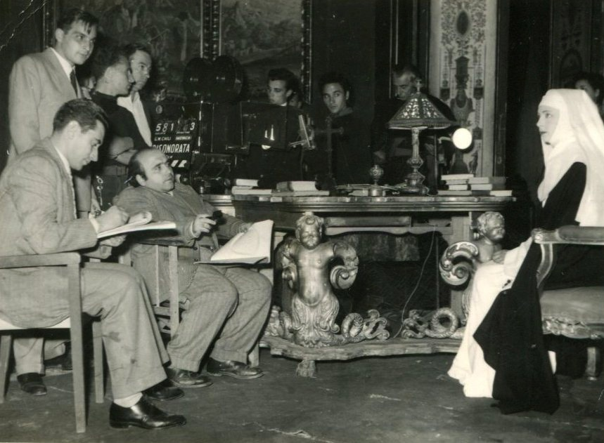 G. W. Chili durante le riprese di "Disonorata senza colpa" 1953